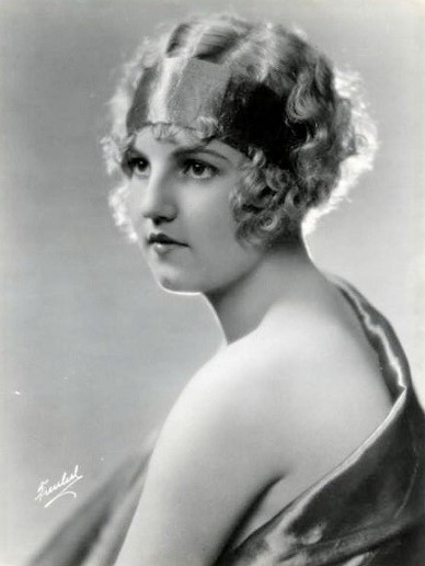 Ena Gregory